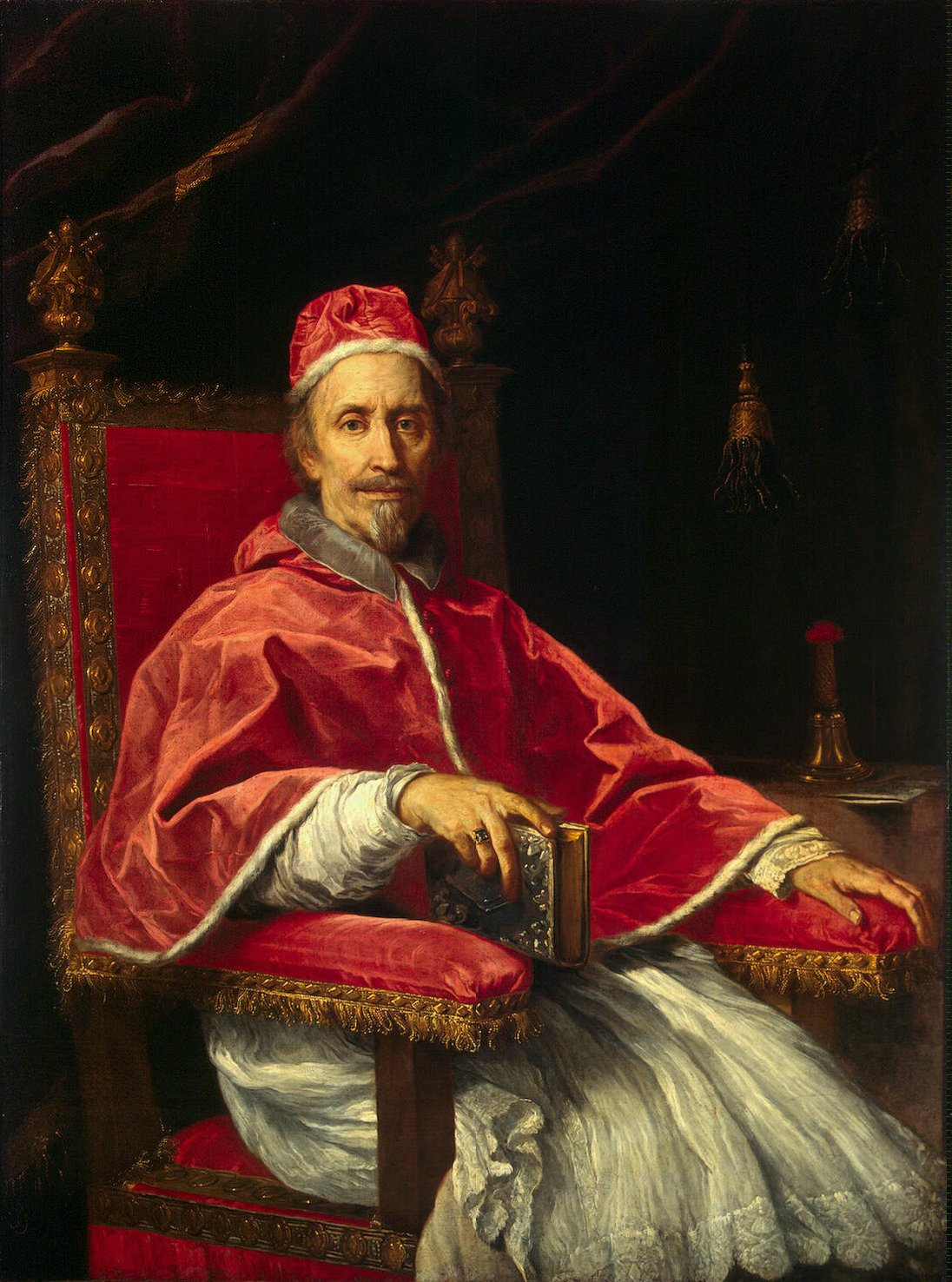 Der Papst ist auf dem Thron sitzend in Dreiviertelansicht (mit deutlichem Verweis auf das Portrait Innozenz’ X. von Velazquez), mit scharfsichtiger psychologischer Durchdringung und Ausdruckskraft dargestellt.